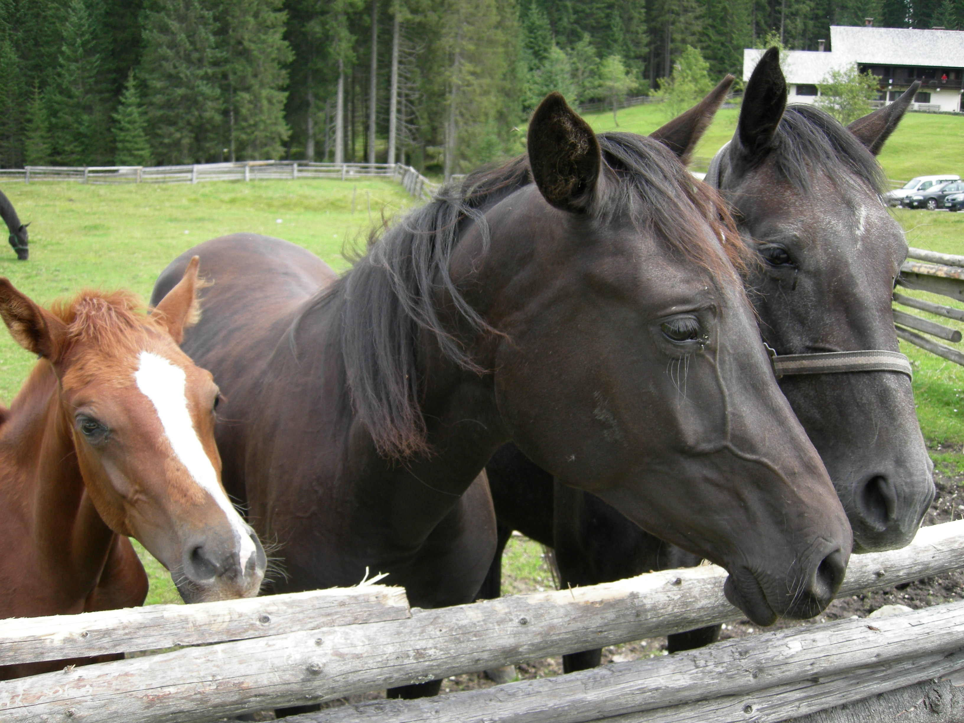 Horses at Mrzli studenec on Pokljuka plateau (summer). Konji pri Mrzlem studencu na Pokljuki.